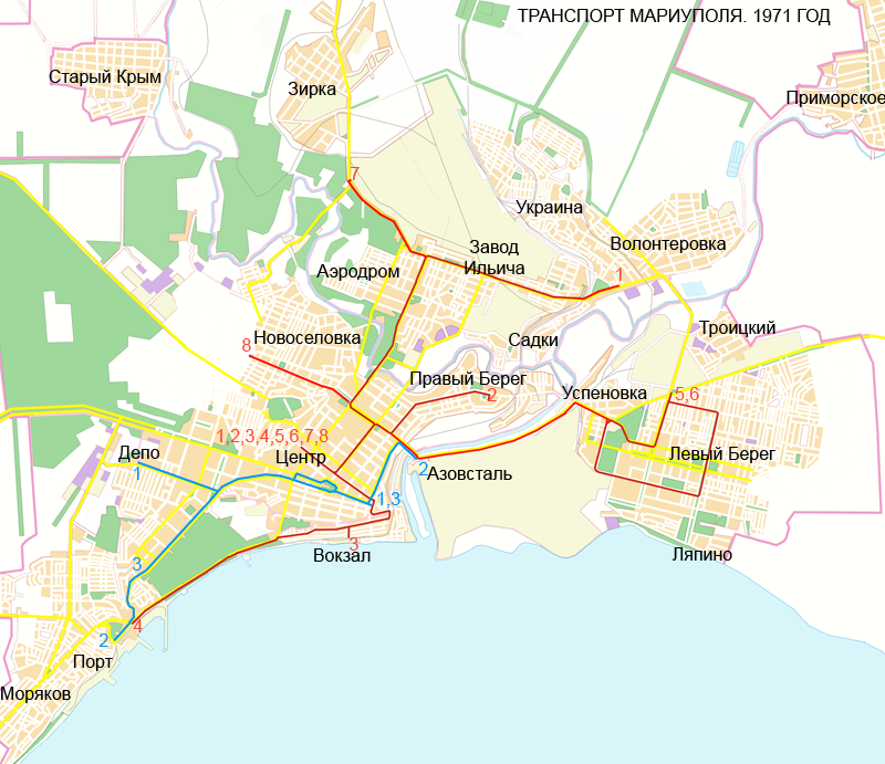 Mariupol transport map map